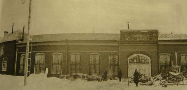 Здание завода С.С. Шадрина, ХIХ век.